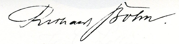 Unterschrift von Richard Bohn